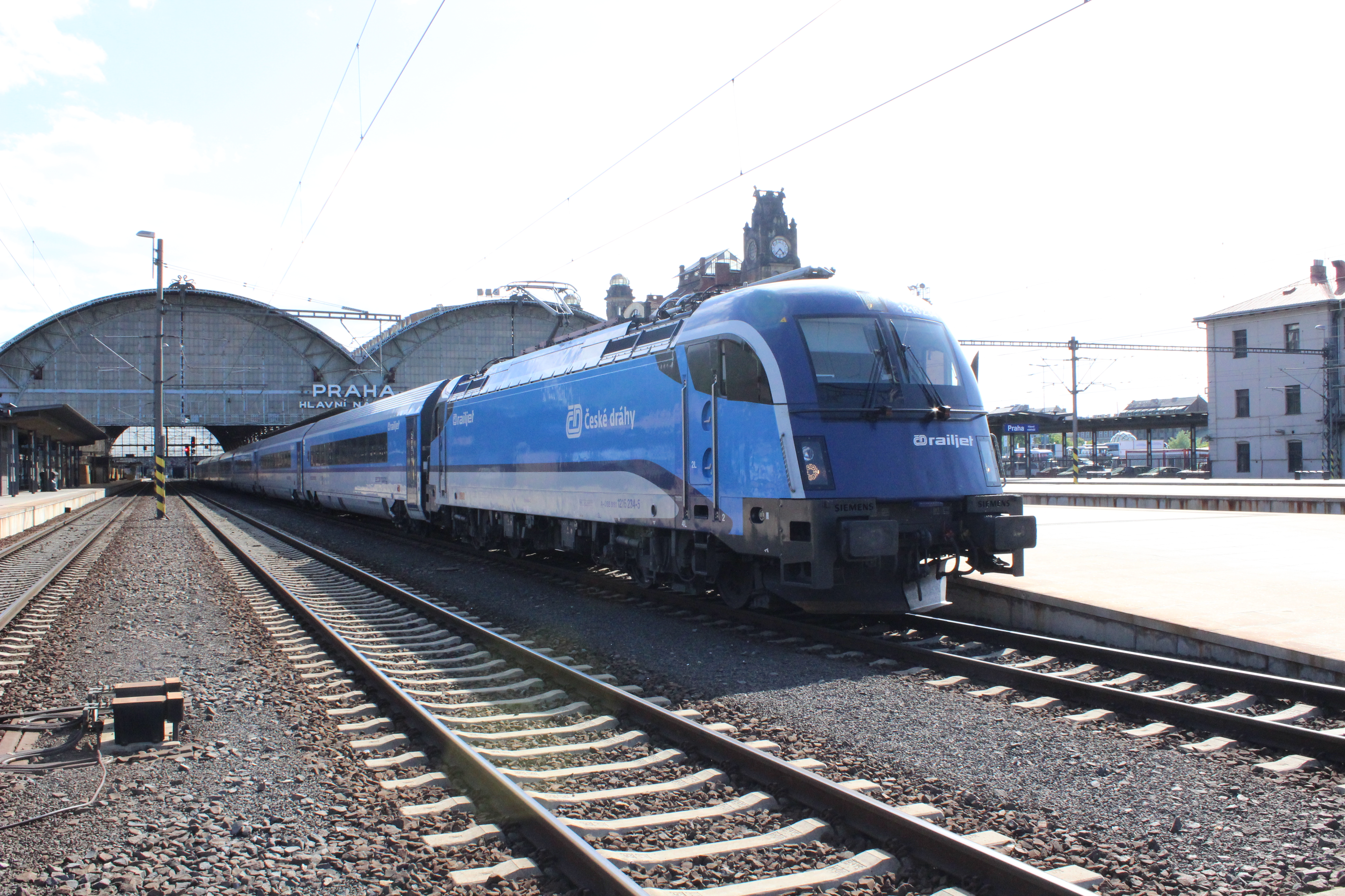 Lokomotiva Railjet stojící na pražském Hlavním nádraží.